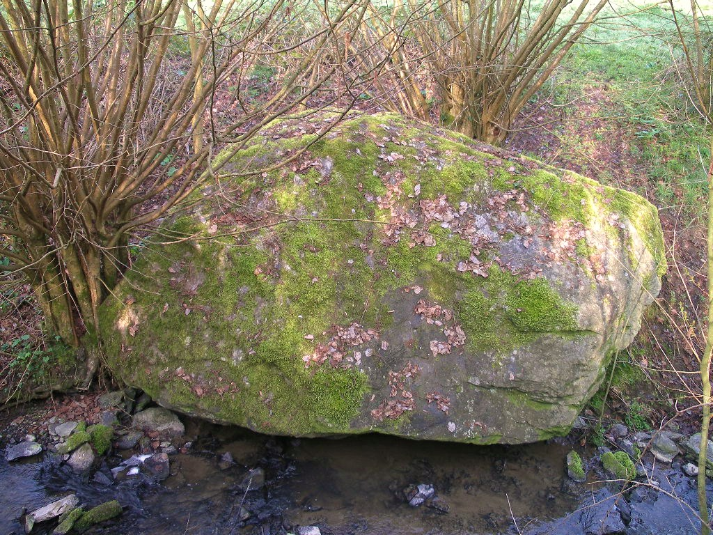 Mégalithe à Saint-Omer (Calvados)